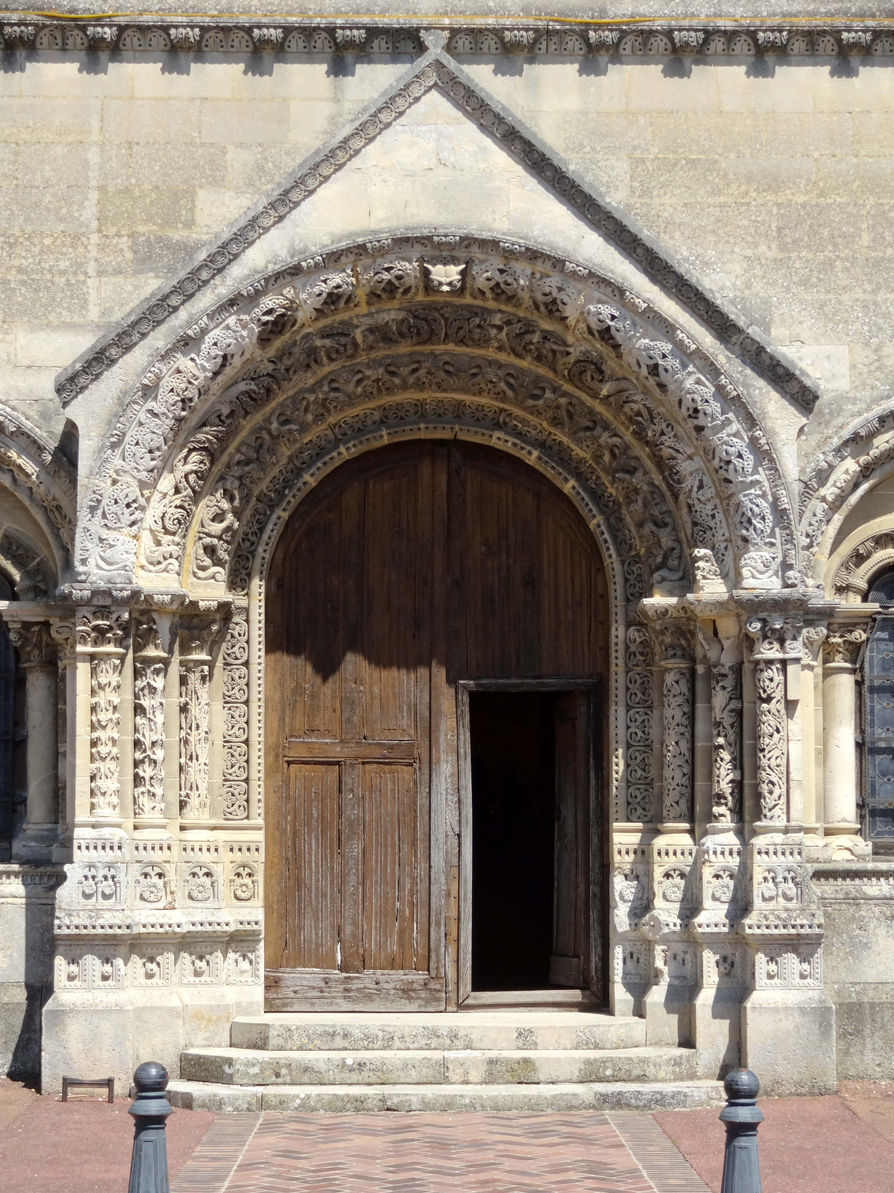 Église Sainte-Madeleine de Trie-Château - voir titre.